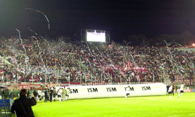 La hinchada de Estudiantes de La Plata, en el Estadio Centenario de Montevideo, durante el partido de los cuartos de final de la Copa Libertadores 2009 ante Defensor Sporting.